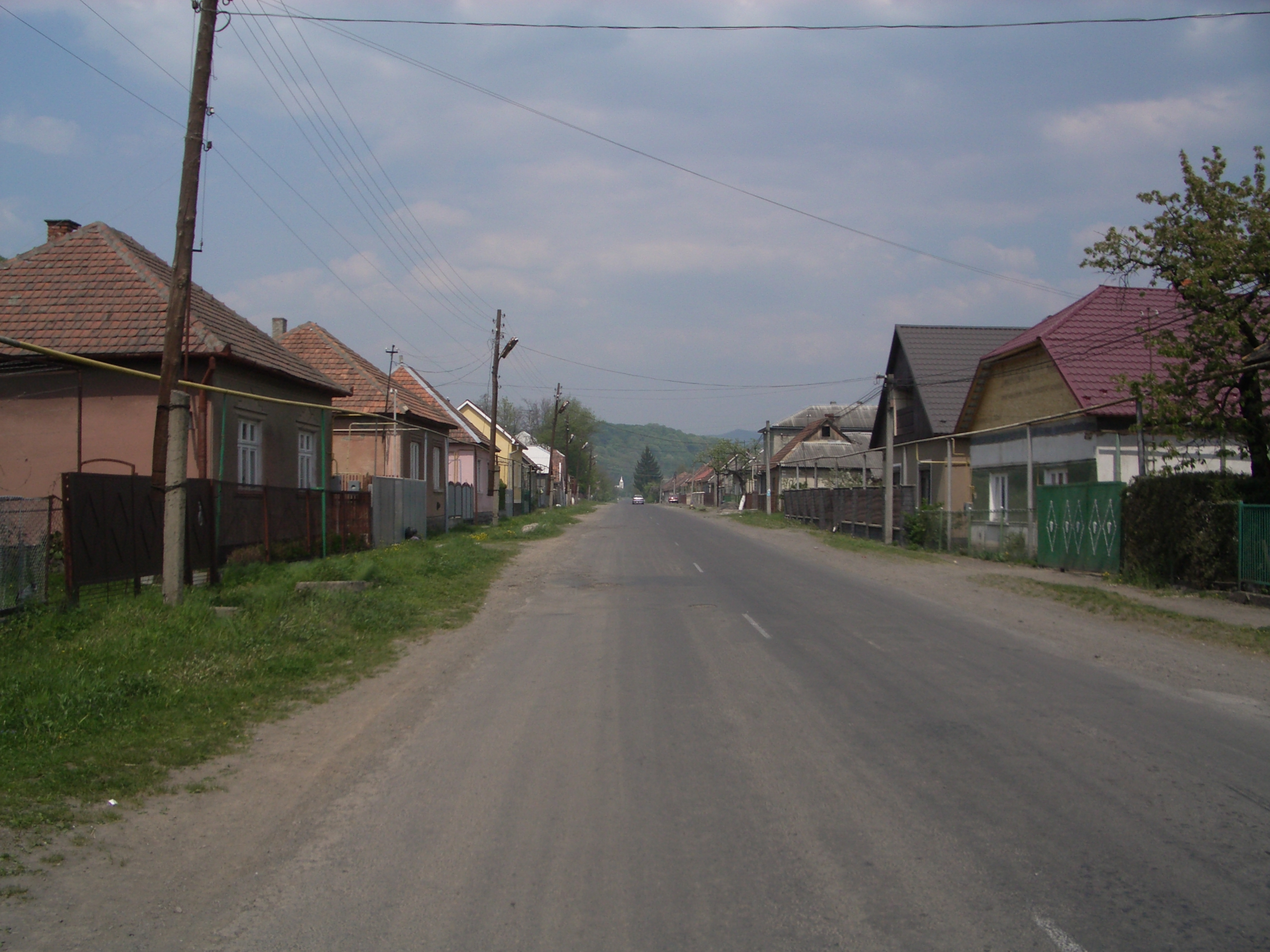 Кольчино Вул. Фрідяшівська